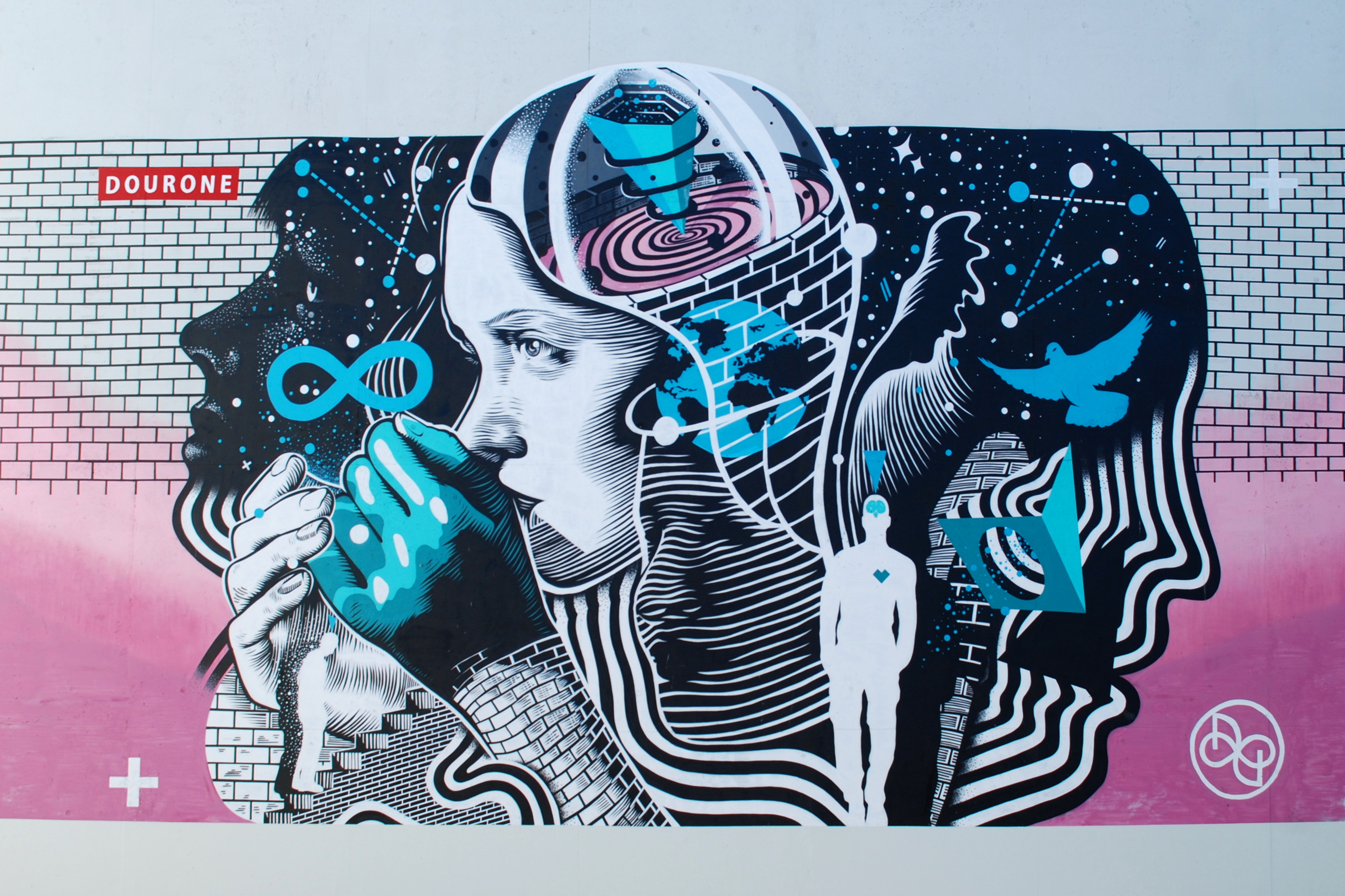 Belgique - Louvain-la-Neuve - Place Raymond Lemaire - Fresques This photo of immovable heritage has been taken in the Walloon Region